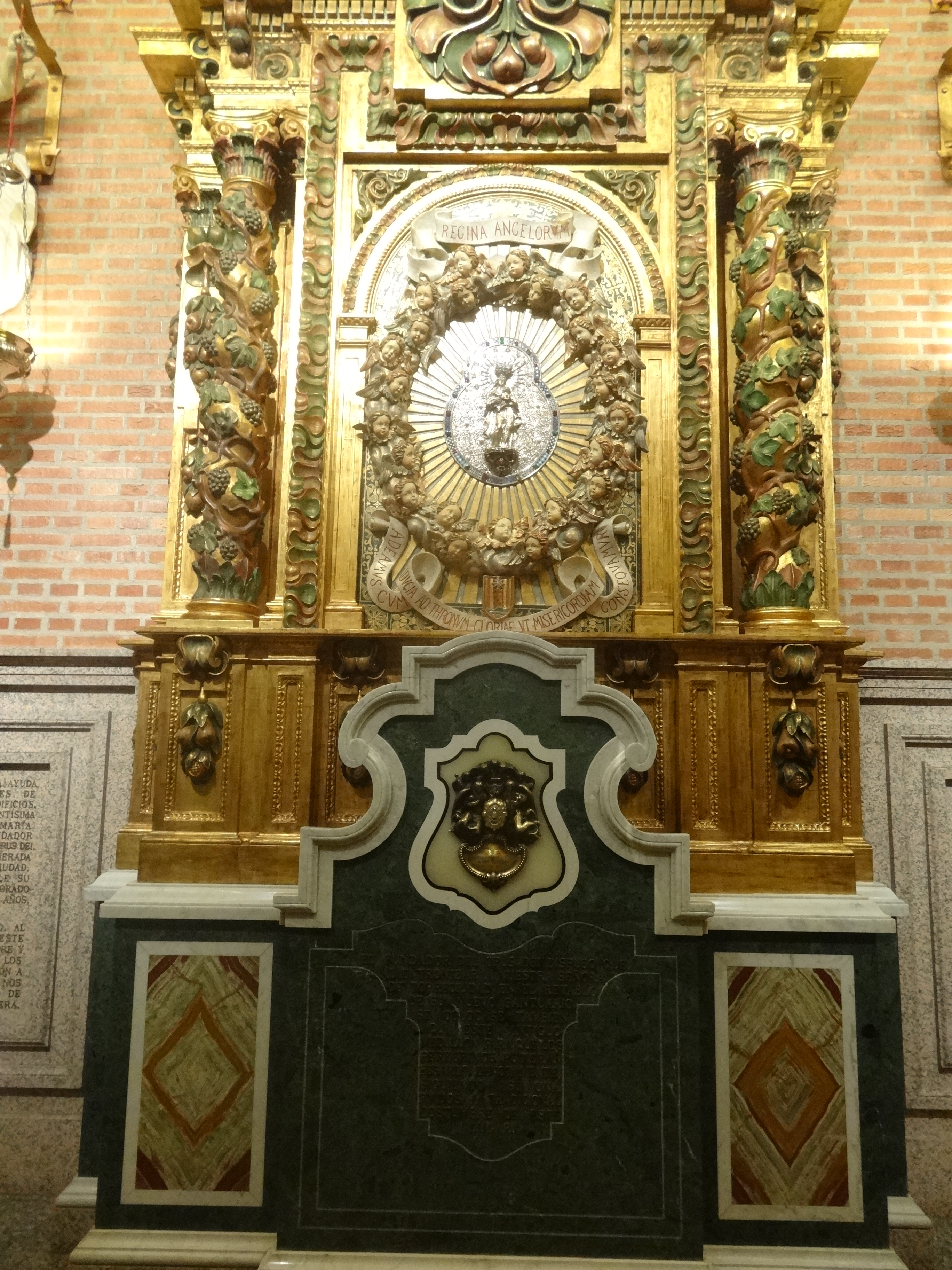 Santuari de Torreciutat.